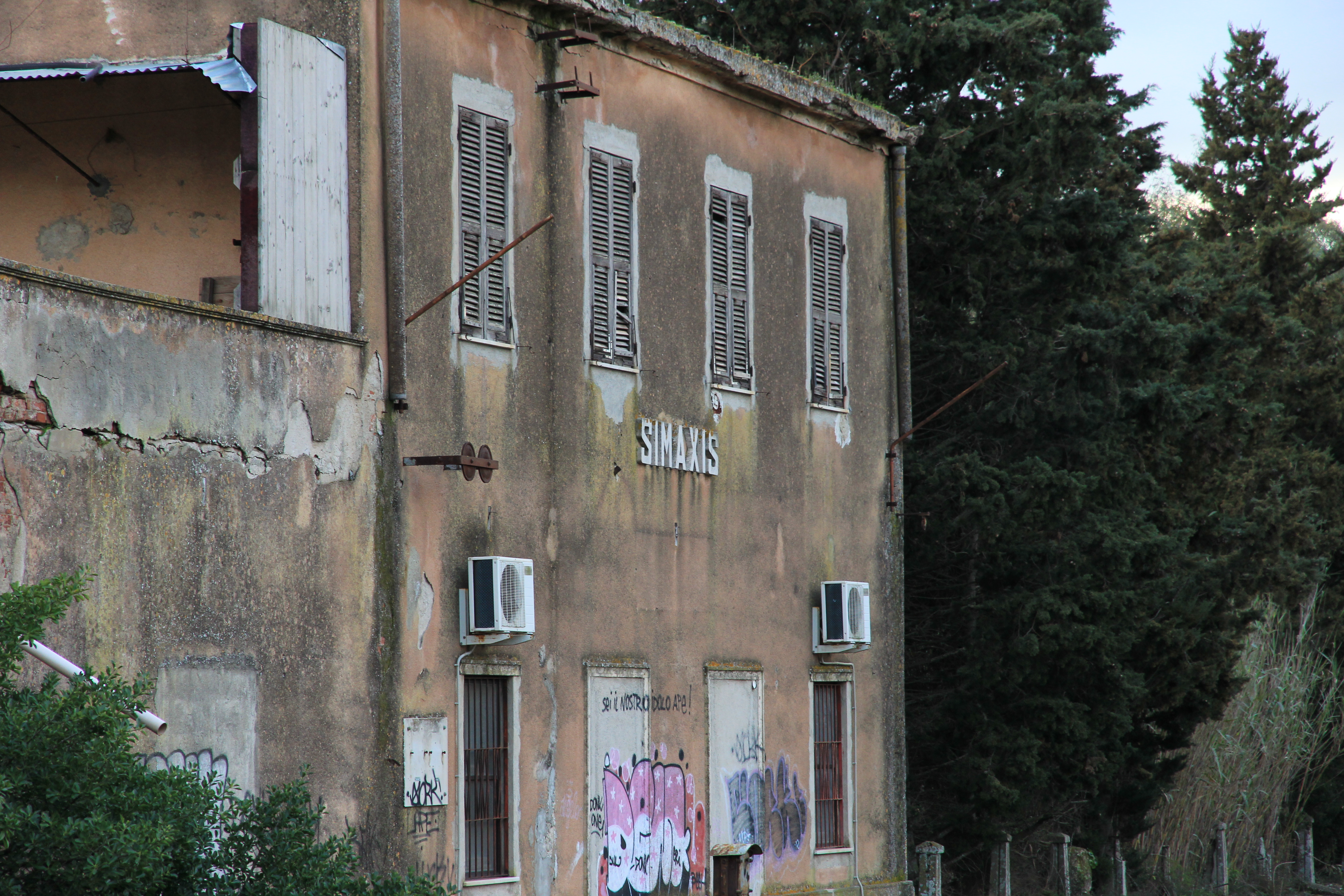 Ex stazione ferroviaria di Simaxis